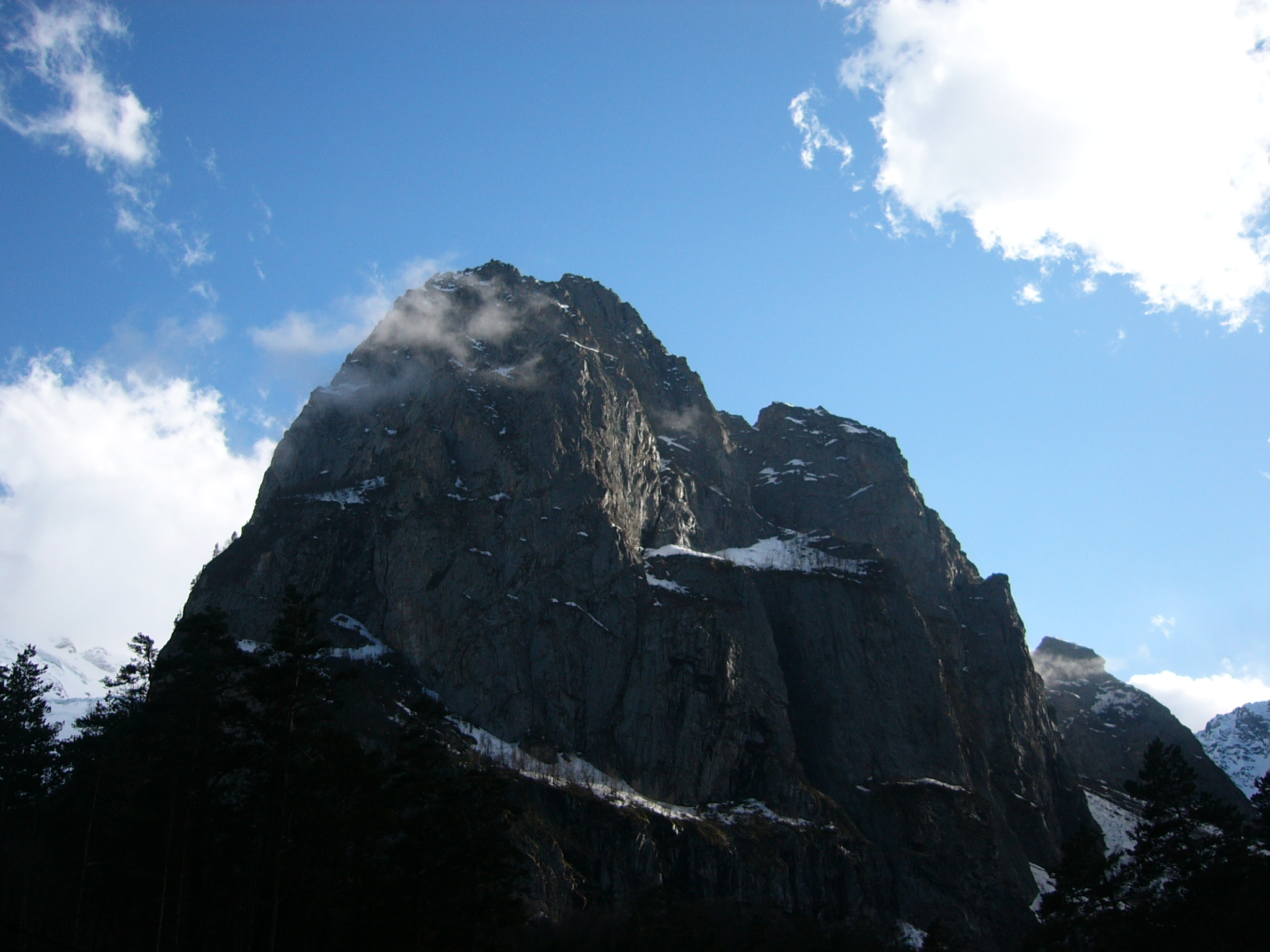 Монах